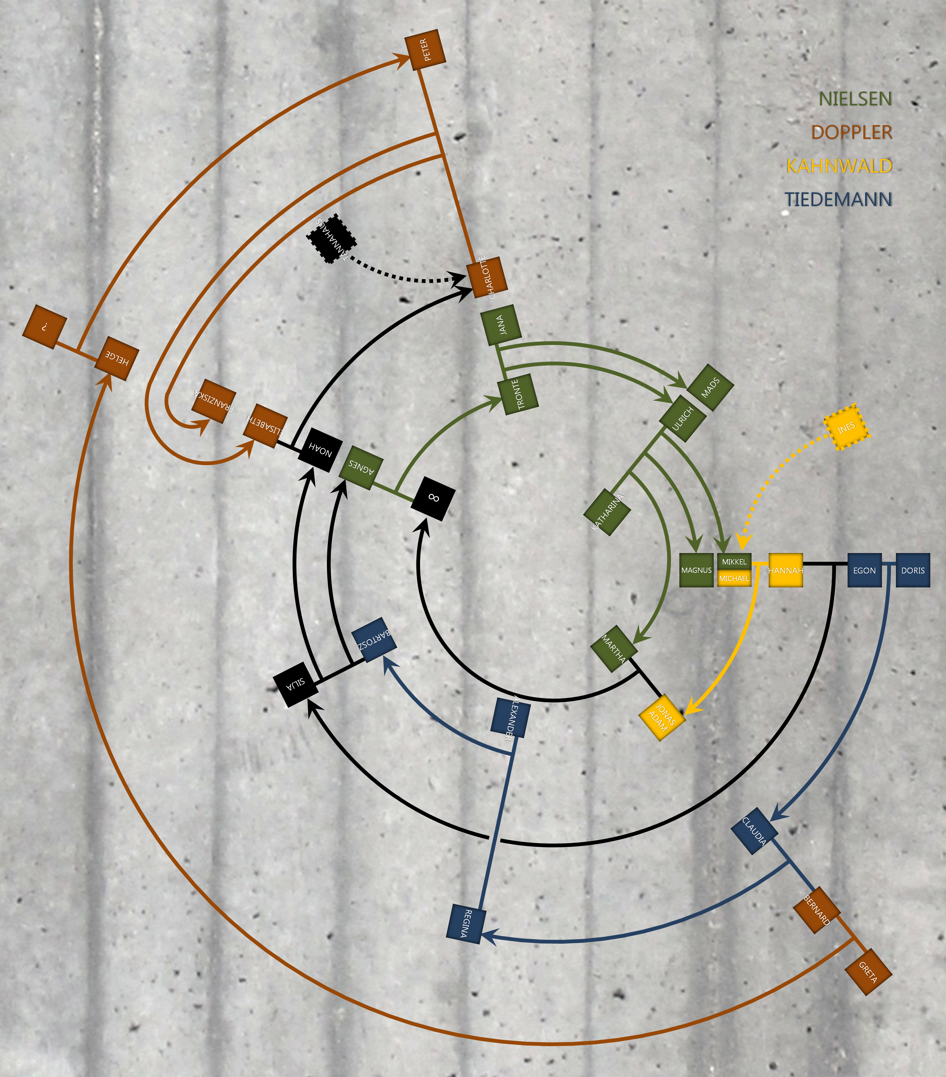 Arbol genealogico circular texto - pablo g vahí